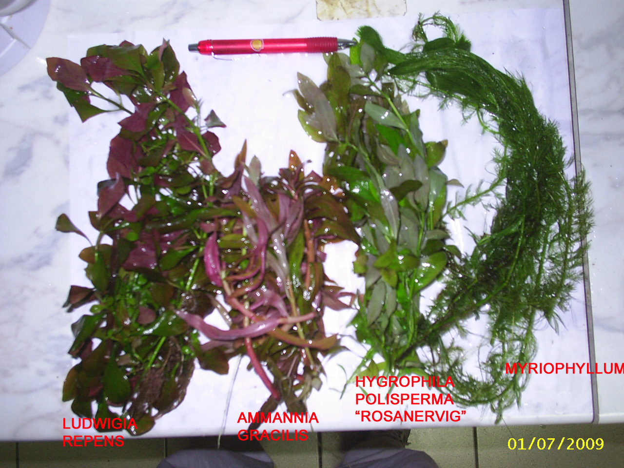 poda 2Latina: Ludwigia repens, Ammannia gracilis, Hygrophila polisperma, Myriophyllum sp.